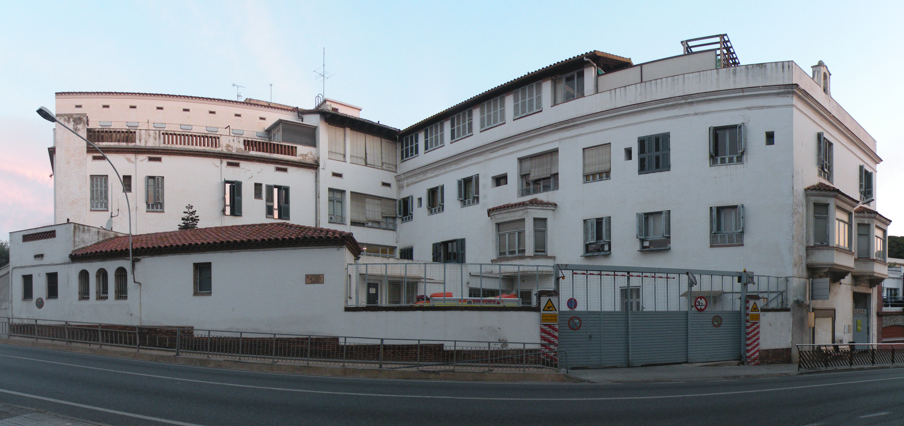 Antic hospital Sant Jaume de Calella, façana